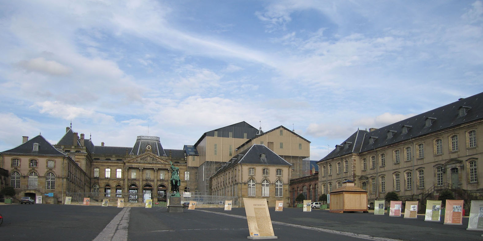 Château de Lunéville It is indexed in the Base Mérimée, a database of architectural heritage maintained by the French Ministry of Culture, under the references PA00106079 and IA00121620 .